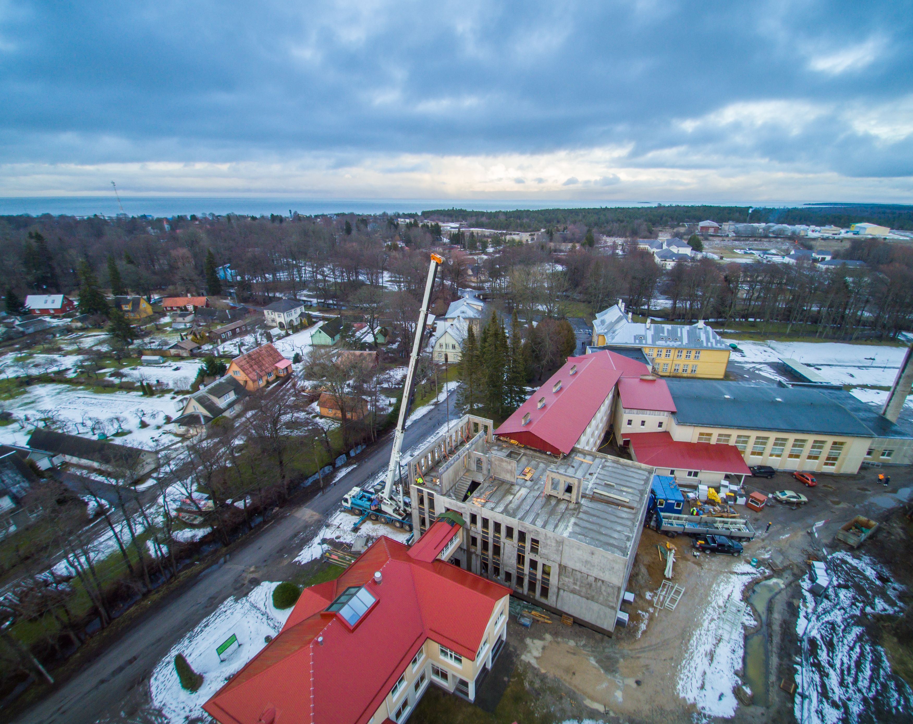 Hiiumaa Gümnaasiumi ehitus - veebruar 2016